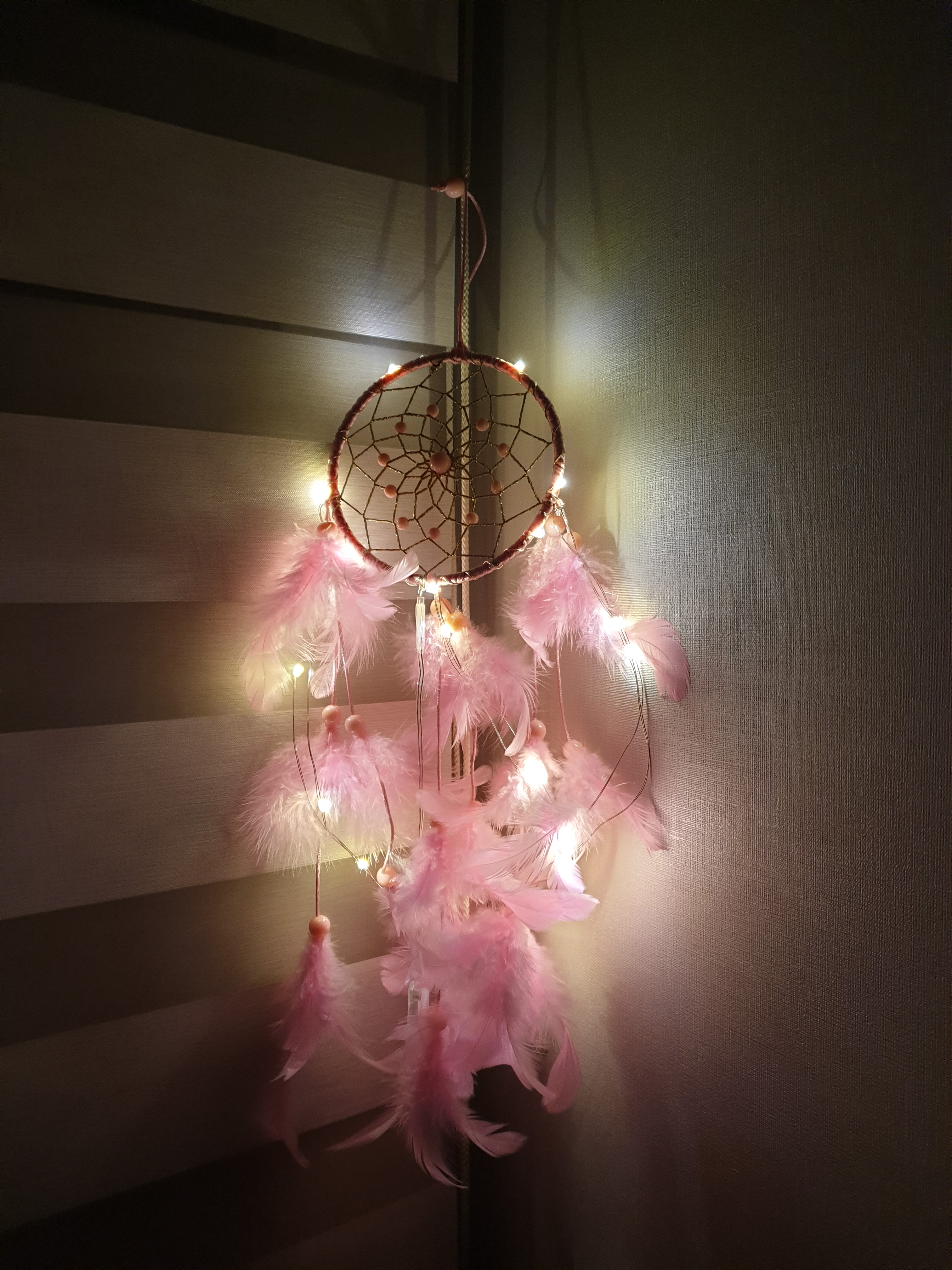 드림캐쳐 조명